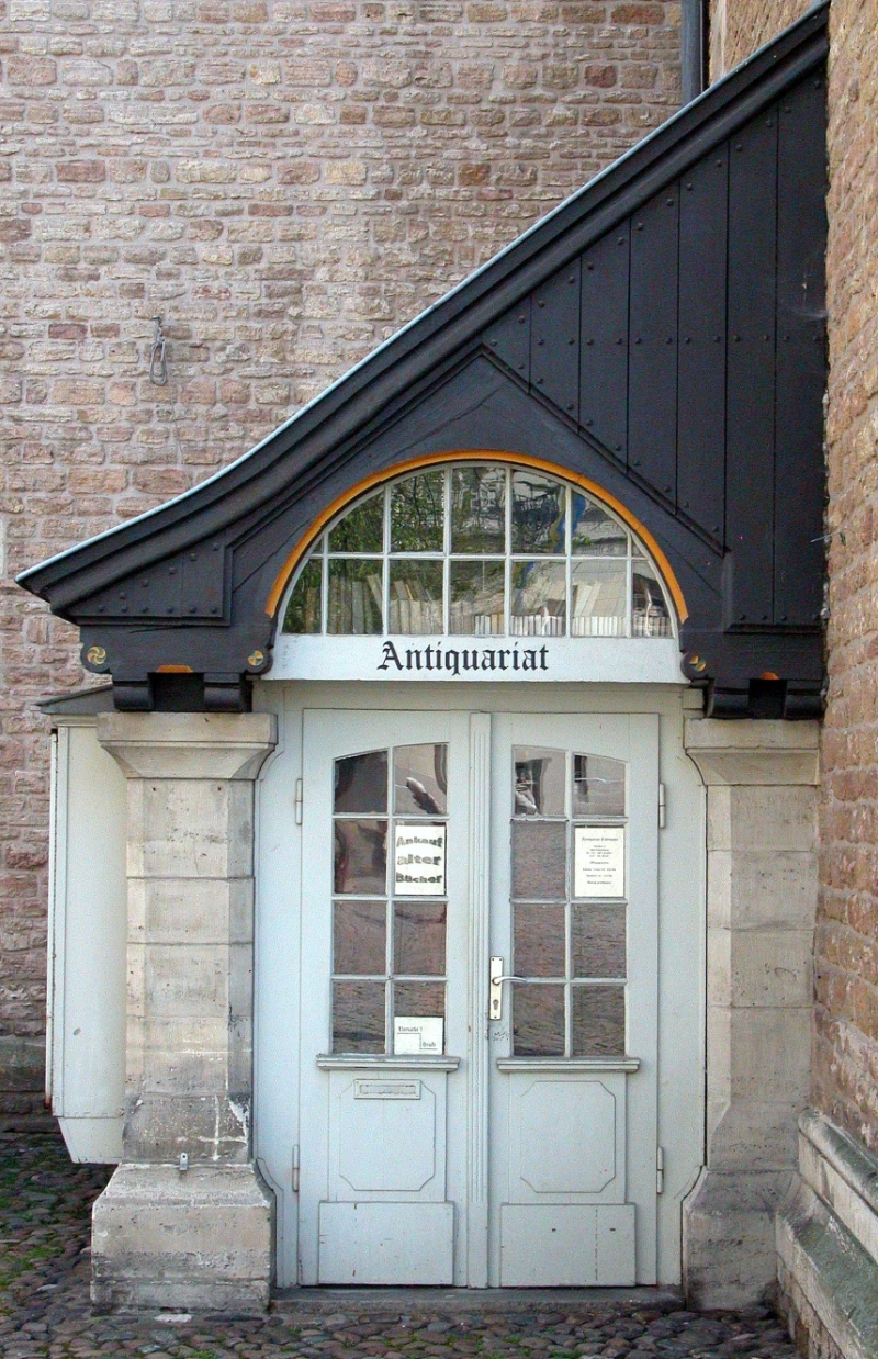 Braunschweig: Antiquariat auf dem Burgplatz - Eingangstür. Braunschweig, Germany: Antique bookshop on Castle Square – front door.